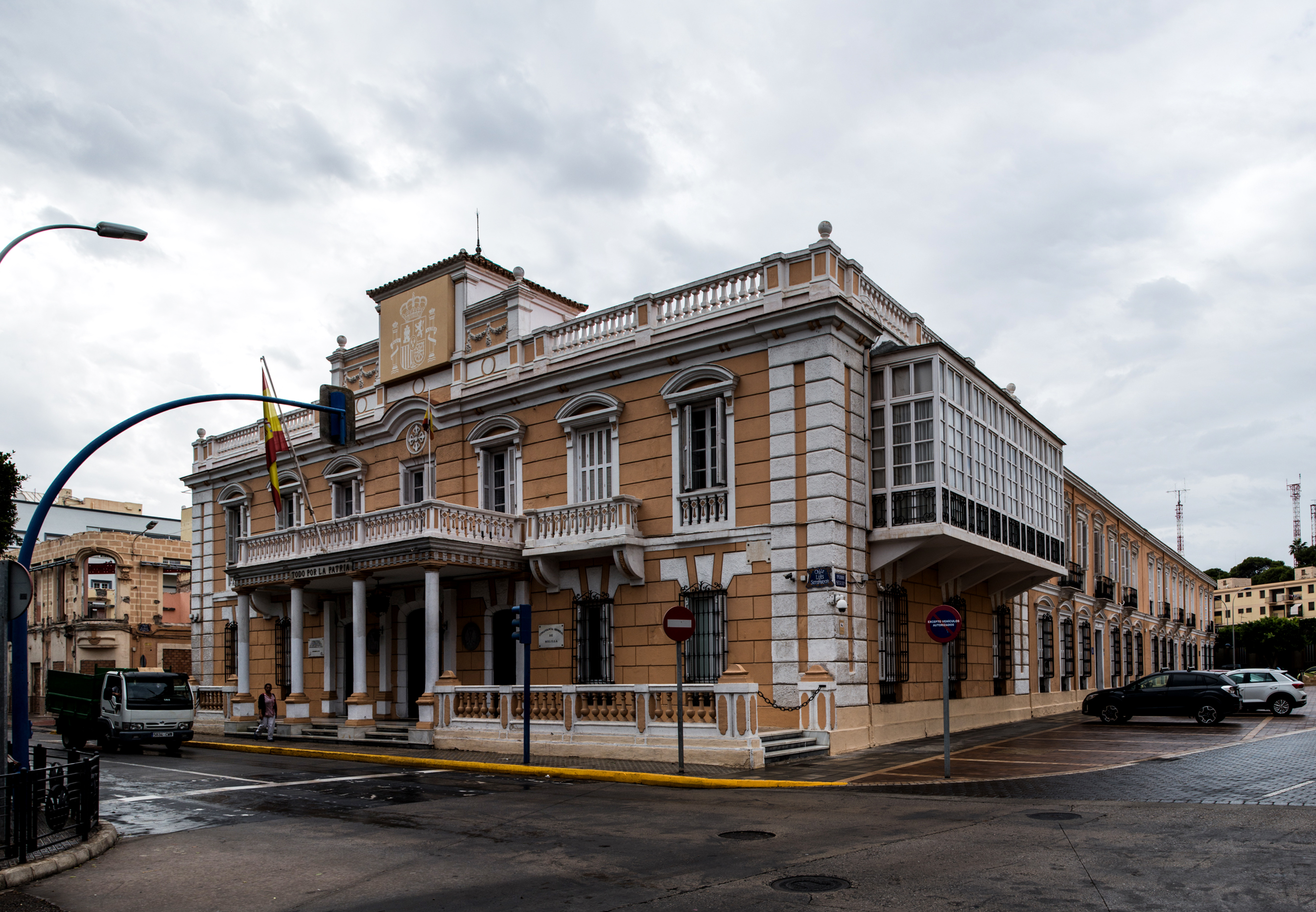 El Edificio de la Comandancia General de Melilla es un edificio de estilo clasicista, sede de la Comandancia General de Melilla, situado en el Ensanche Modernista de Melilla, en la Calle Luis de Sotomayor que forma parte del Conjunto Histórico Artístico de la Ciudad de Melilla, Bien de Interés Cultural de la ciudad española de Melilla.